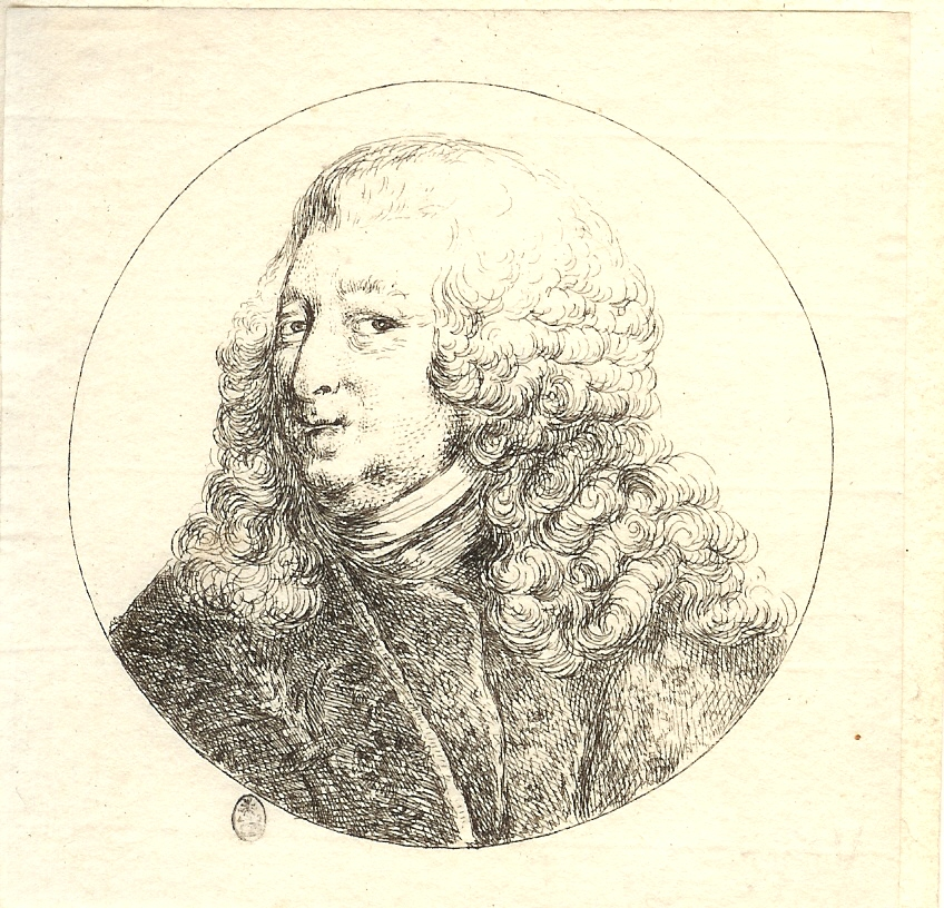 Angelo Quirini, der Senator